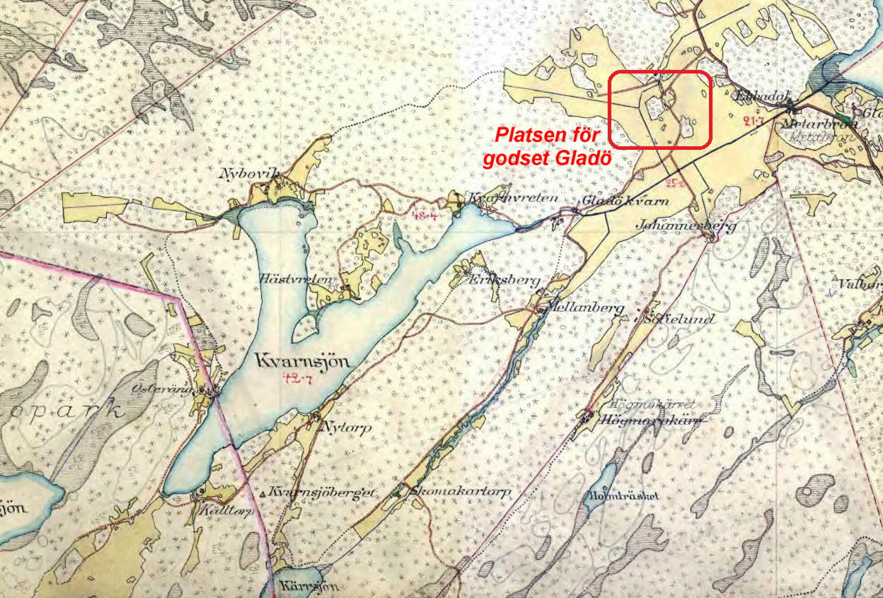 Kvarnsjön i Huddinge med omgivning